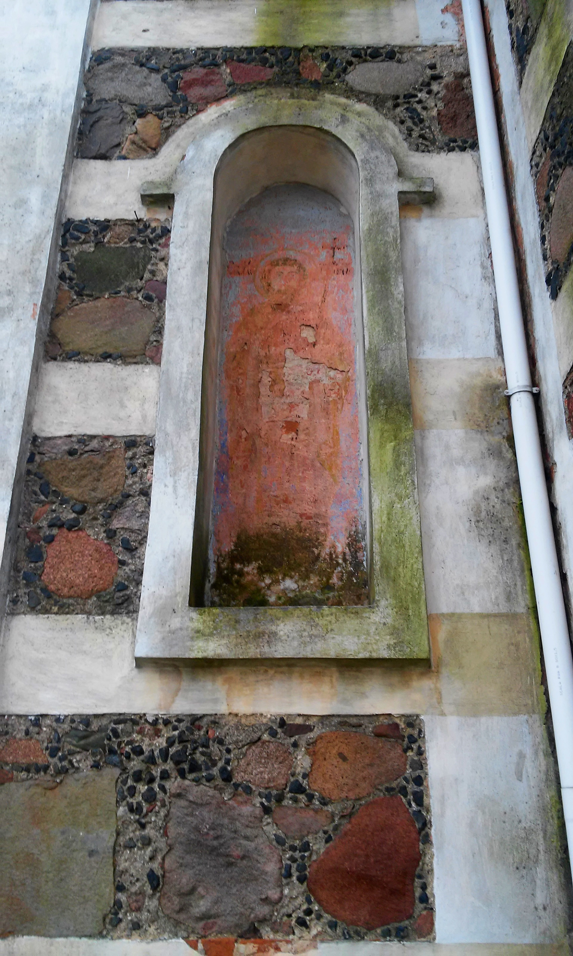 Zniszczony fresk z postacią św. Cyryla (?) po północnej stronie elewacji cerkwi w Nosowie